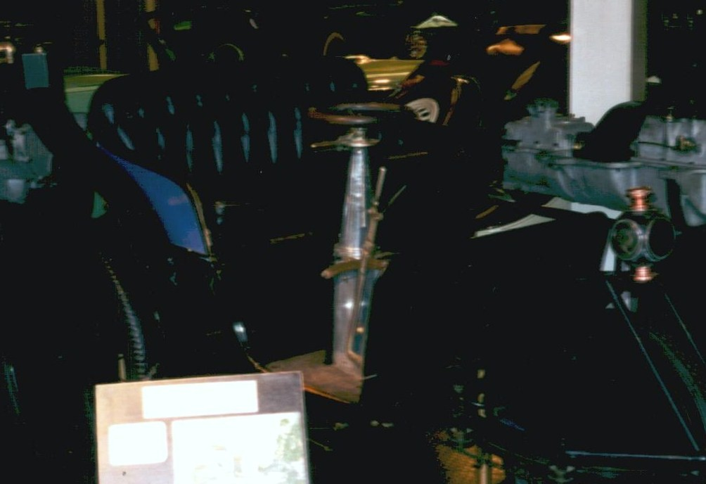 Mildé et Mondos 1900, hergestellt durch Mildé, ausgestellt im Musée Henri Malartre in Rochetaillée.